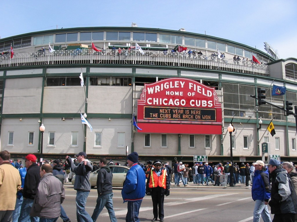 Wrigley-Field, Chicago (IL)